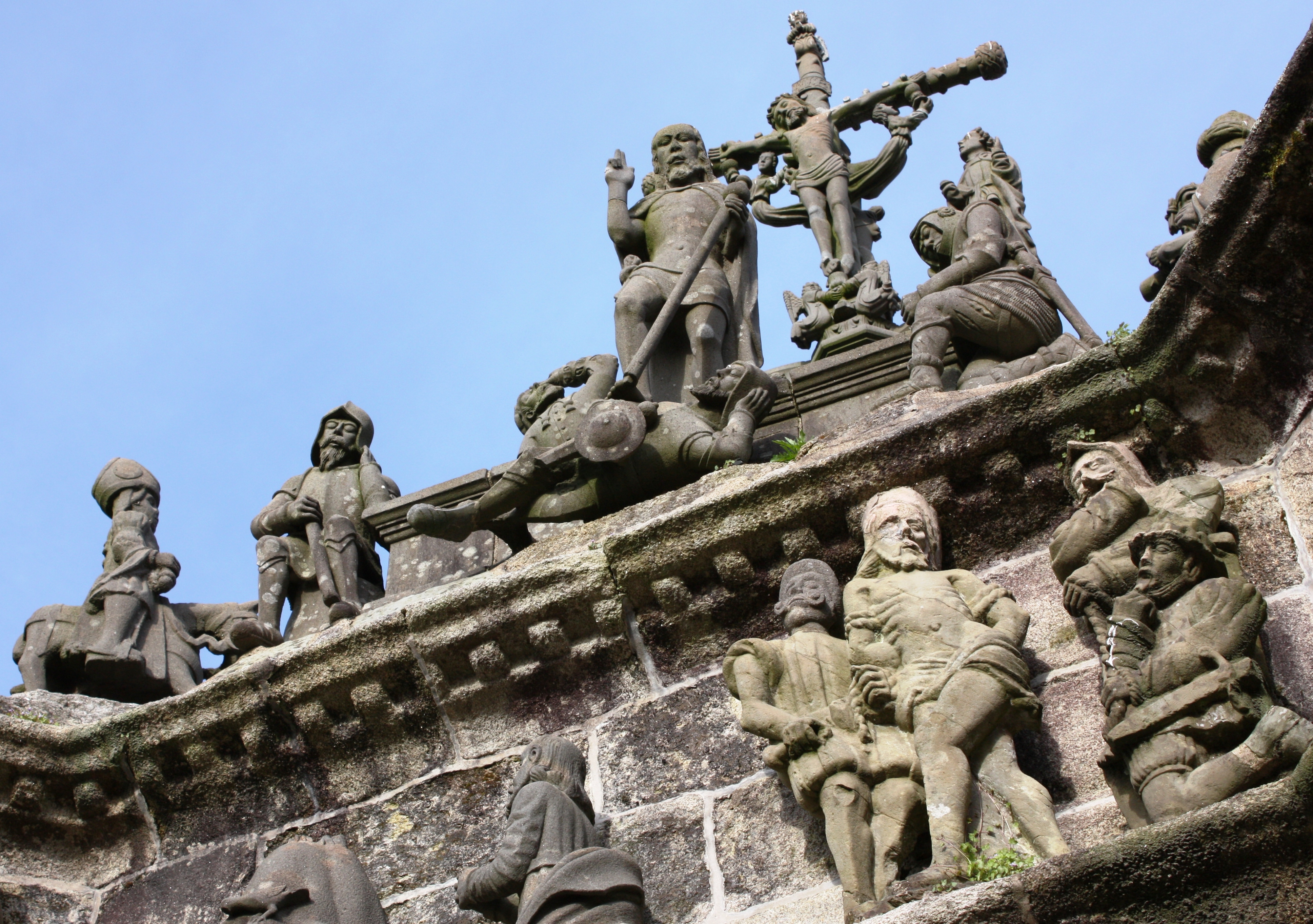 Enclos paroissial, Pleyben (juillet 2010): le calvaire. .